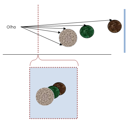 Template:Método de Ray casting